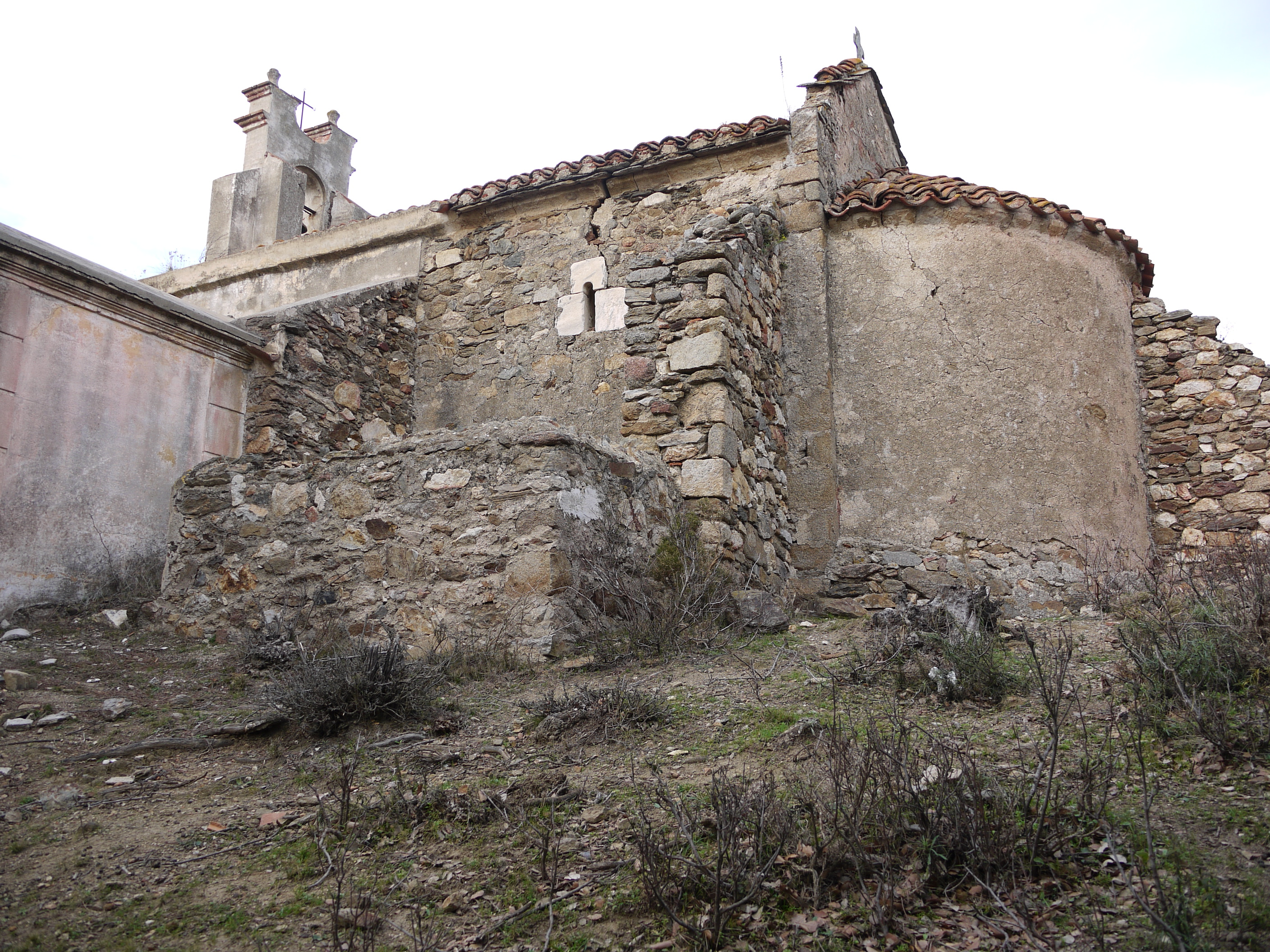 Côté sud de l'église Saint-Pierre de Laner